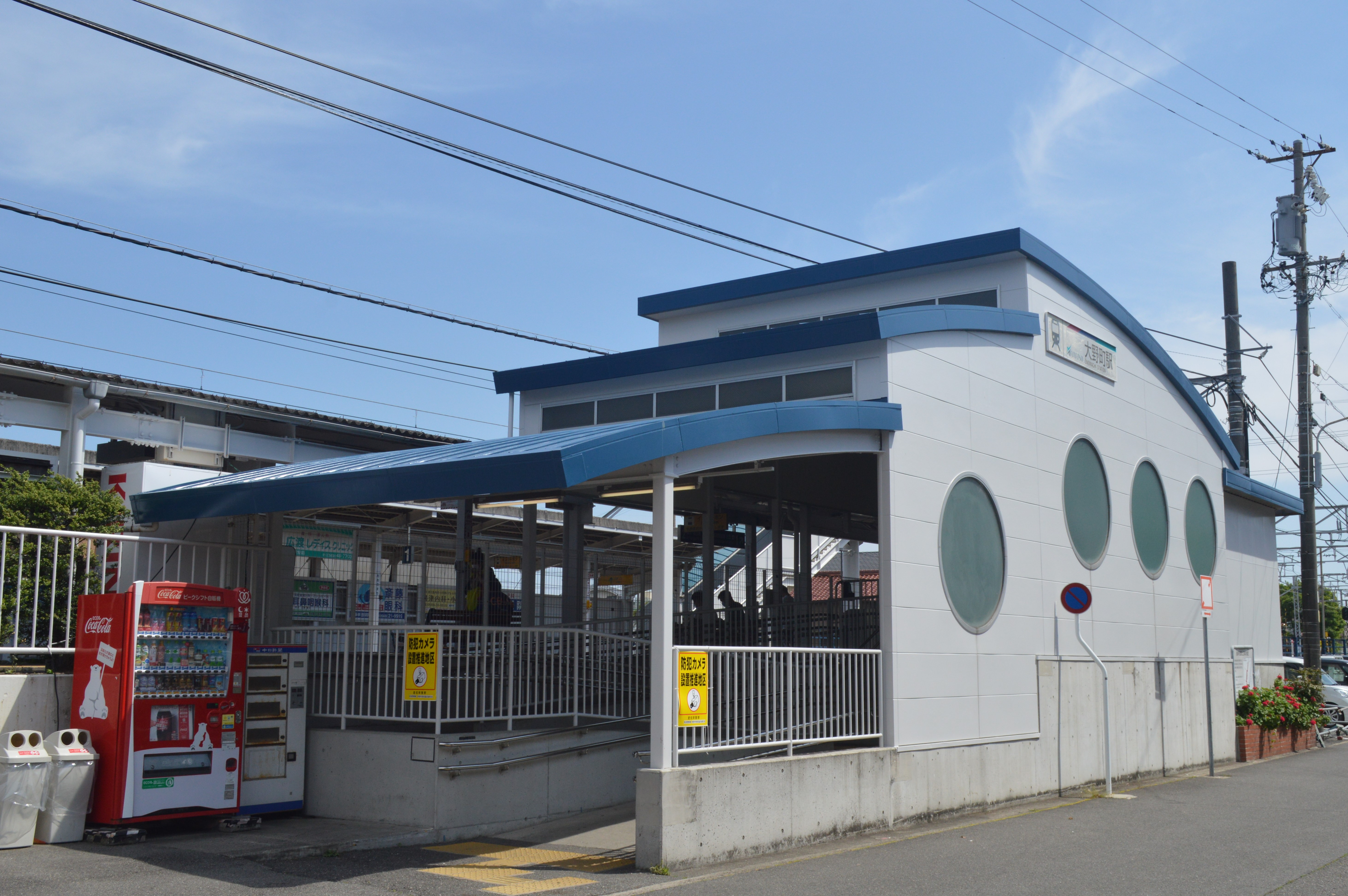 愛知県常滑市にある名鉄常滑線大野町駅。